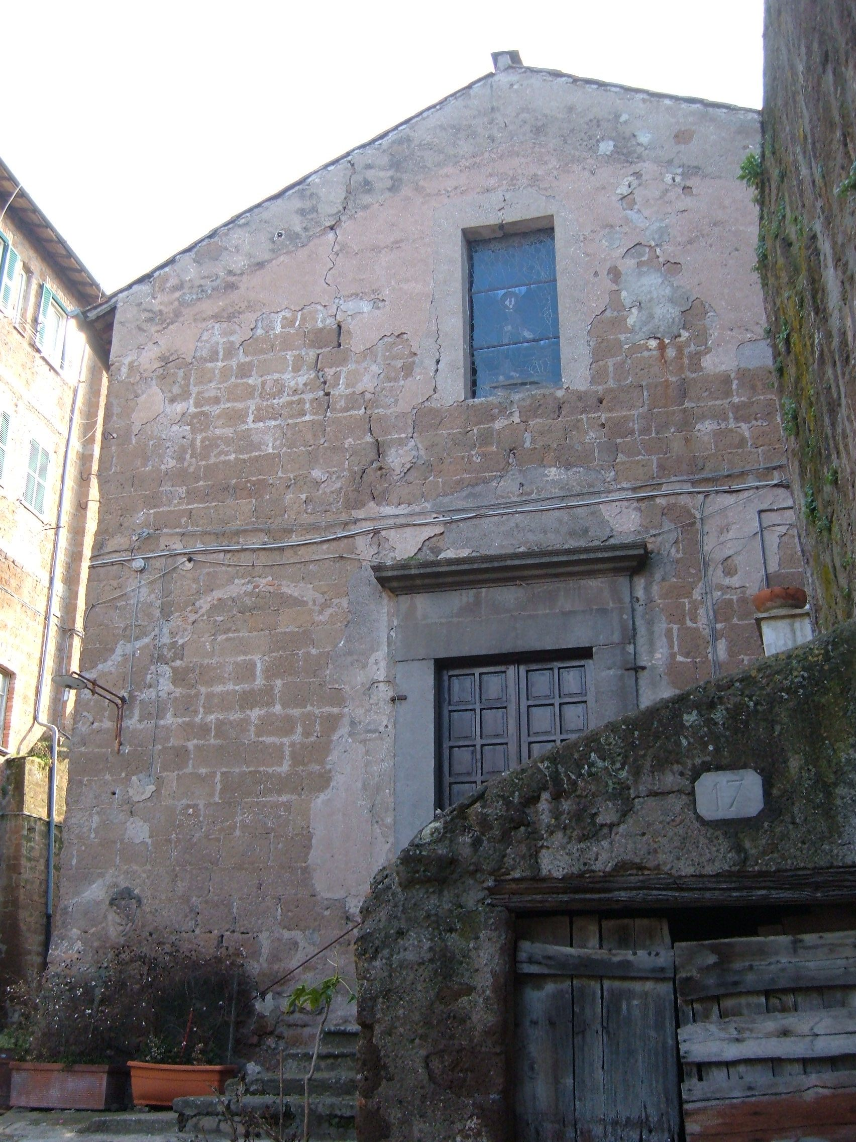 Facciata della chiesa medievale di San Pietro (Vetralla).